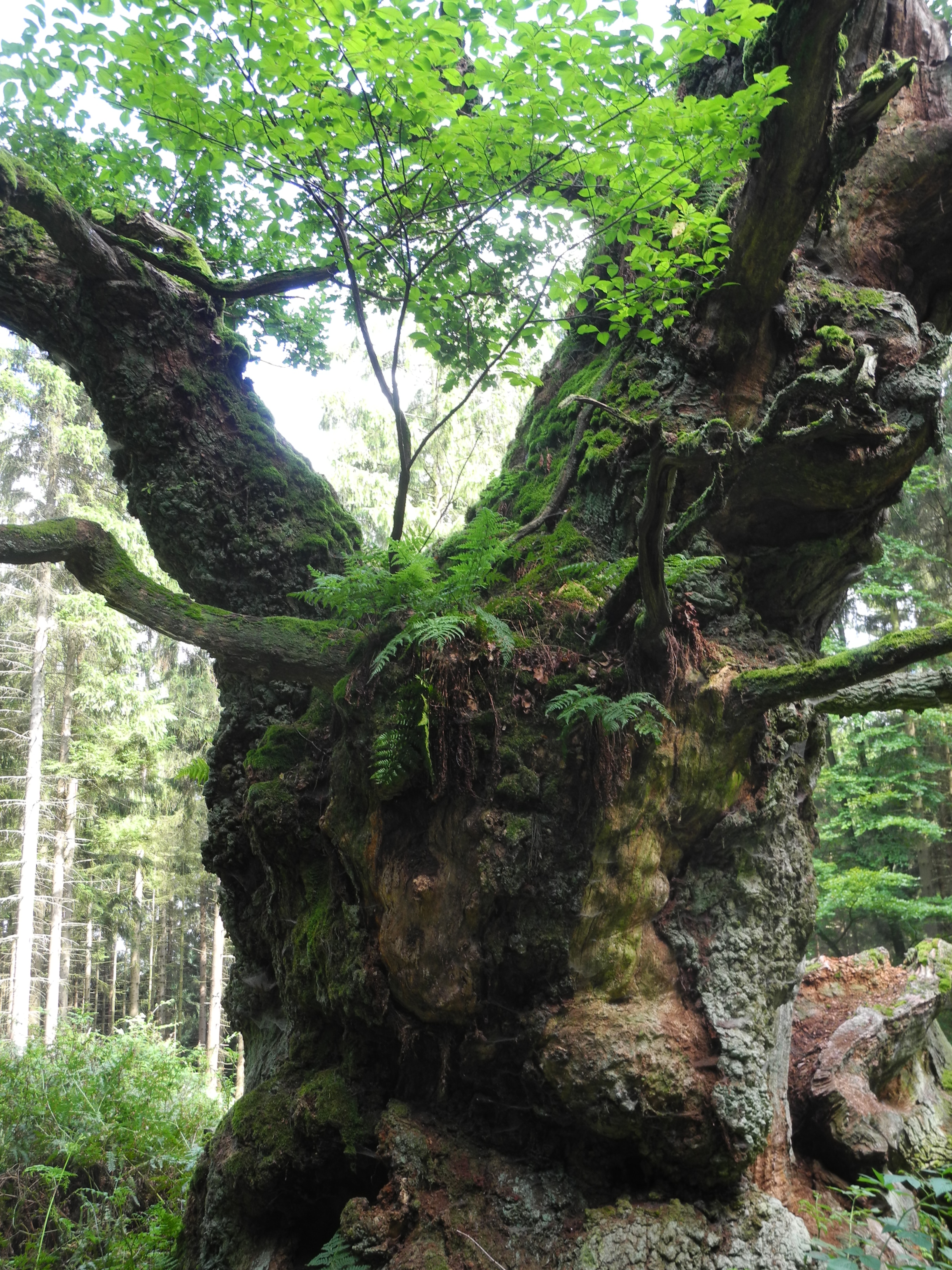 Naturdenkmal im Landkreis Kassel 6.33.673. Sehr alte Huteeiche „Gerichtseiche“ (eine Stieleiche, Quercus robur) im Reinhardswald, ca. 3,0 km nördlich des Ortsrandes von Holzhausen.